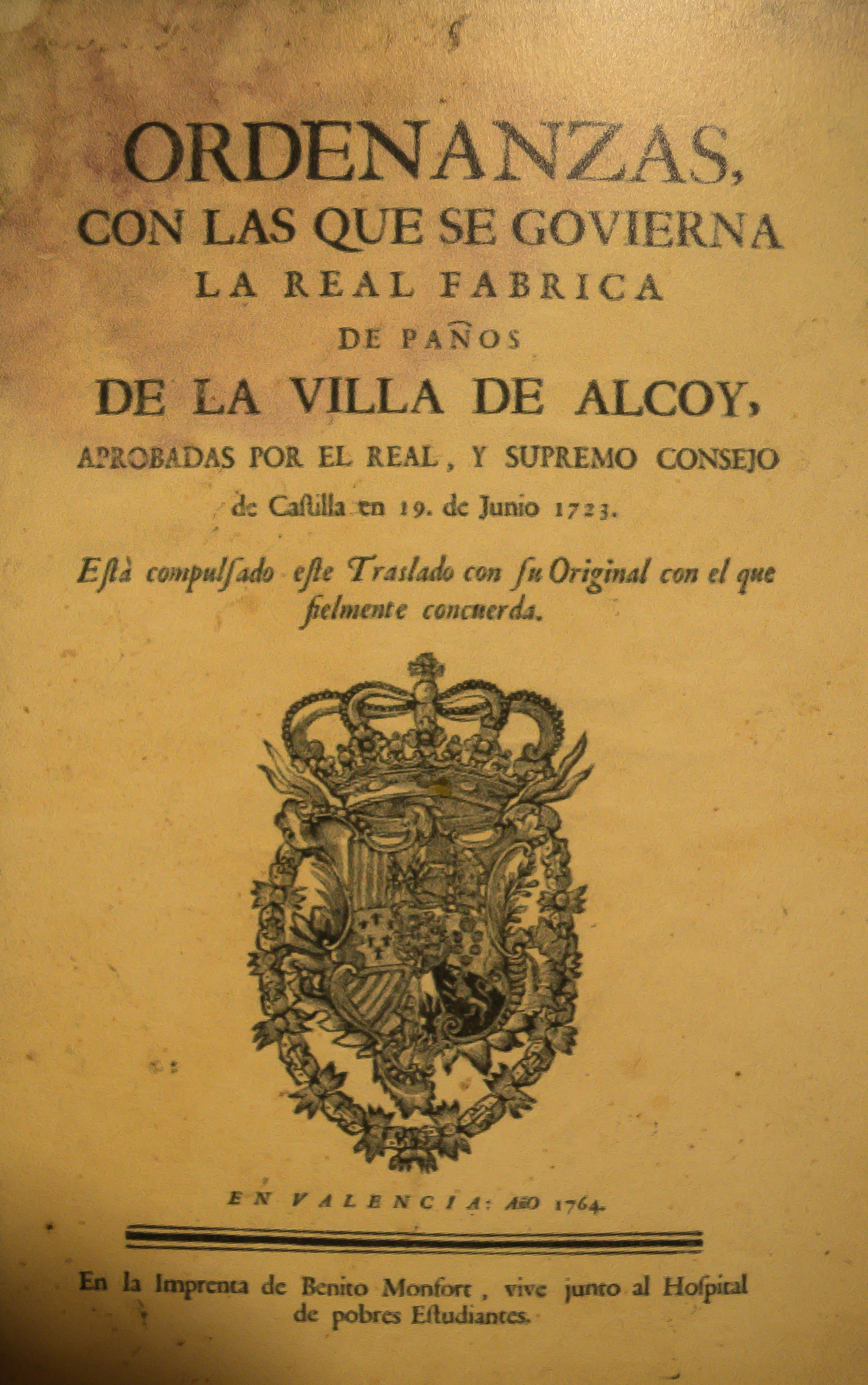 Ordenanzas con las que se gobierna la real fábrica de paños de Alcoy, aprobadas por el real y supremo Consejo de Castilla en 19 de junio de 1723. Museo Arqueológico Municipal de Alcoy.